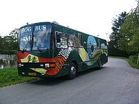 Hjørring Bibliotekernes Bogbus.